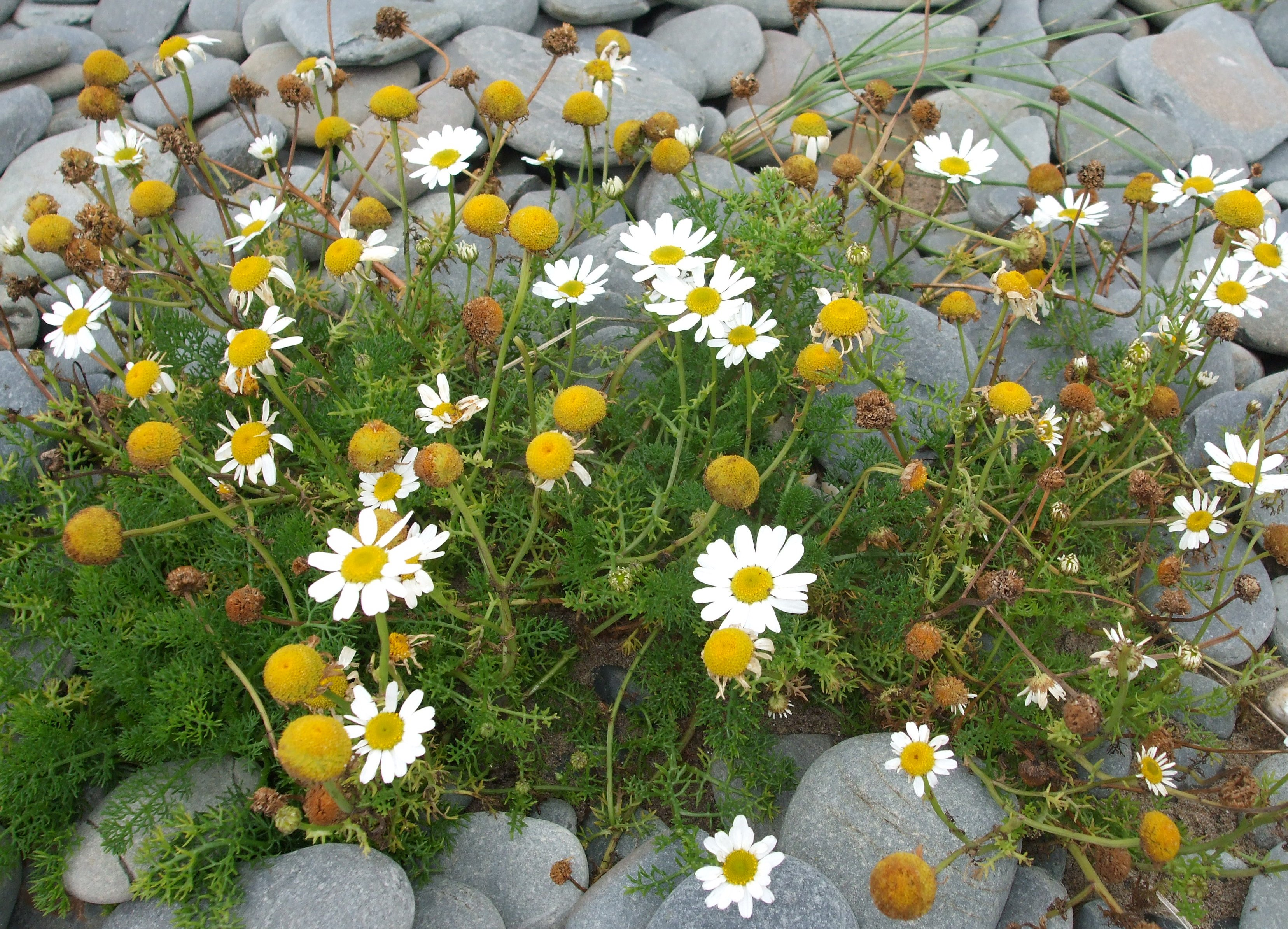 Tripleurospermum maritimum Borth